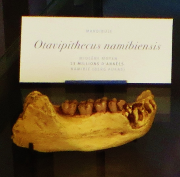 Fossil of Otavipithecus, an extinct mammal- Took the photo at Musee d'Histoire Naturelle, Paris